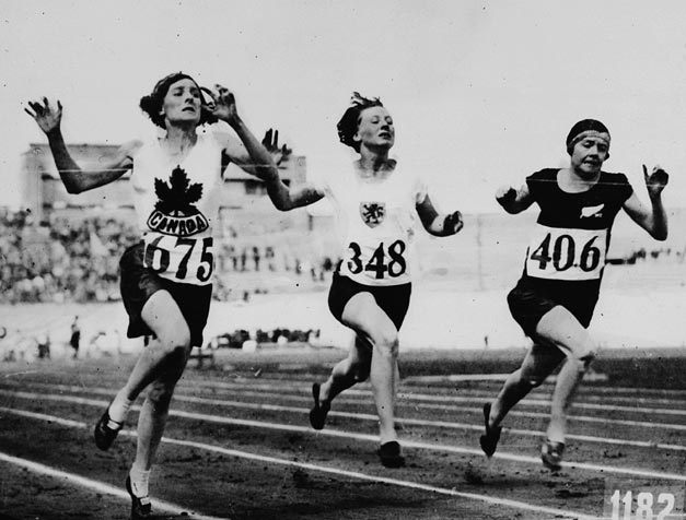 Title / Titre : Myrtle Cook of Canada (left) winning a preliminary heat in the women's 100 metres race at the VIIIth Summer Olympic Games / Myrtle Cook (à gauche), du Canada, remportant une éliminatoire pour l'épreuve du 100 mètres femmes, aux VIIIe Jeux Olympiques d'été Creator(s) / Créateur(s) : Unknown / Inconnu Date(s) : 1928 Reference No. / Numéro de référence : MIKAN 3191809, 3623313 Location / Lieu : Amsterdam, Netherlands / Amsterdam, Pays-Bas Credit / Mention de source : Library and Archives Canada, PA-150994 / Bibliothèque et Archives Canada, PA-150994